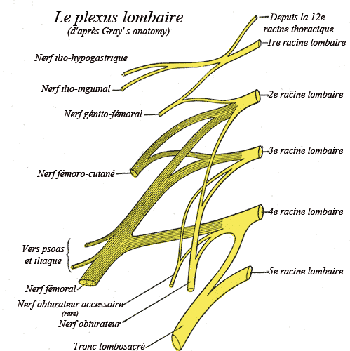 plexus lombaire